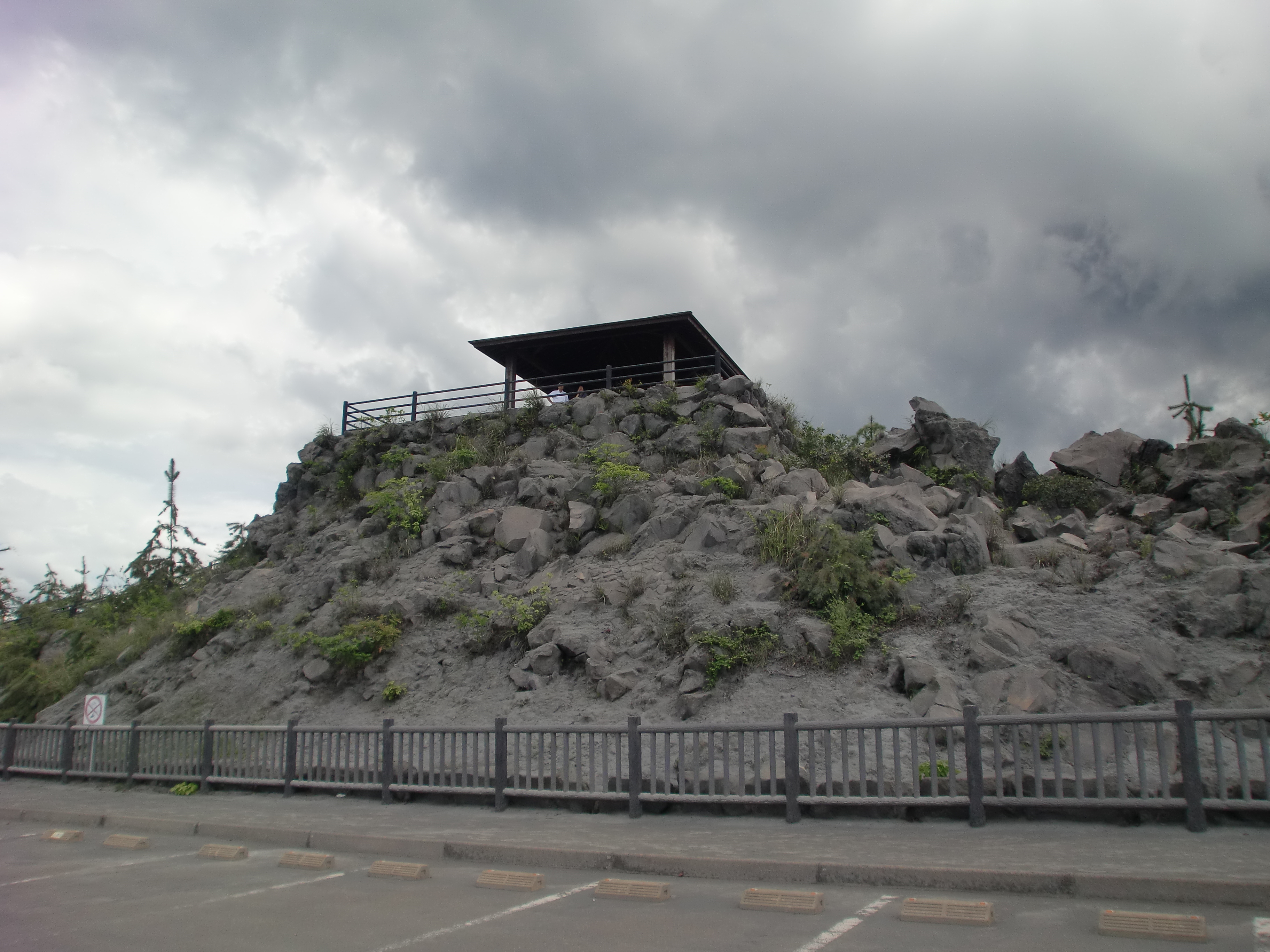 桜島横山町にある烏島展望所。元々は烏島は島であったが、火山活動による火山噴出物（溶岩）の流出により埋没し桜島と陸続きとなった。